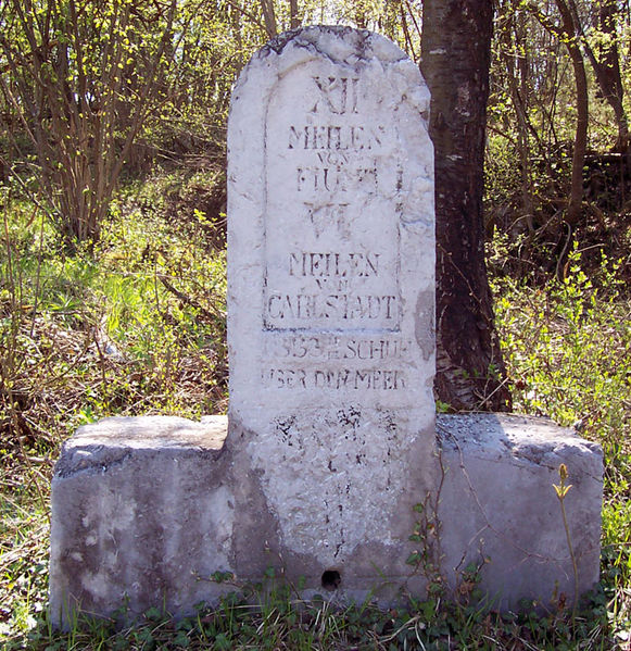 Milja na Lujzijani kod mjesta Nadvučnik.